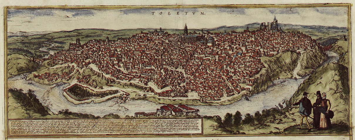 Toledo